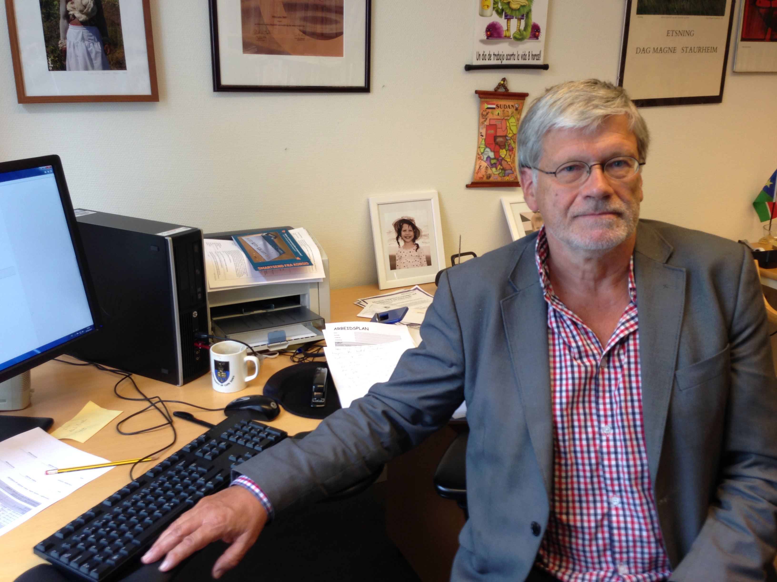 Anders Breidlid at his office